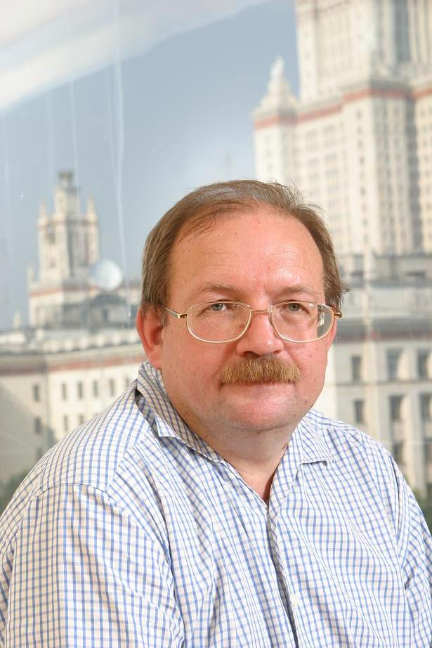 Сергей Юрьевич Соловьёв — математик, доктор физико-математических наук, профессор кафедры алгоритмических языков факультета ВМК МГУ.